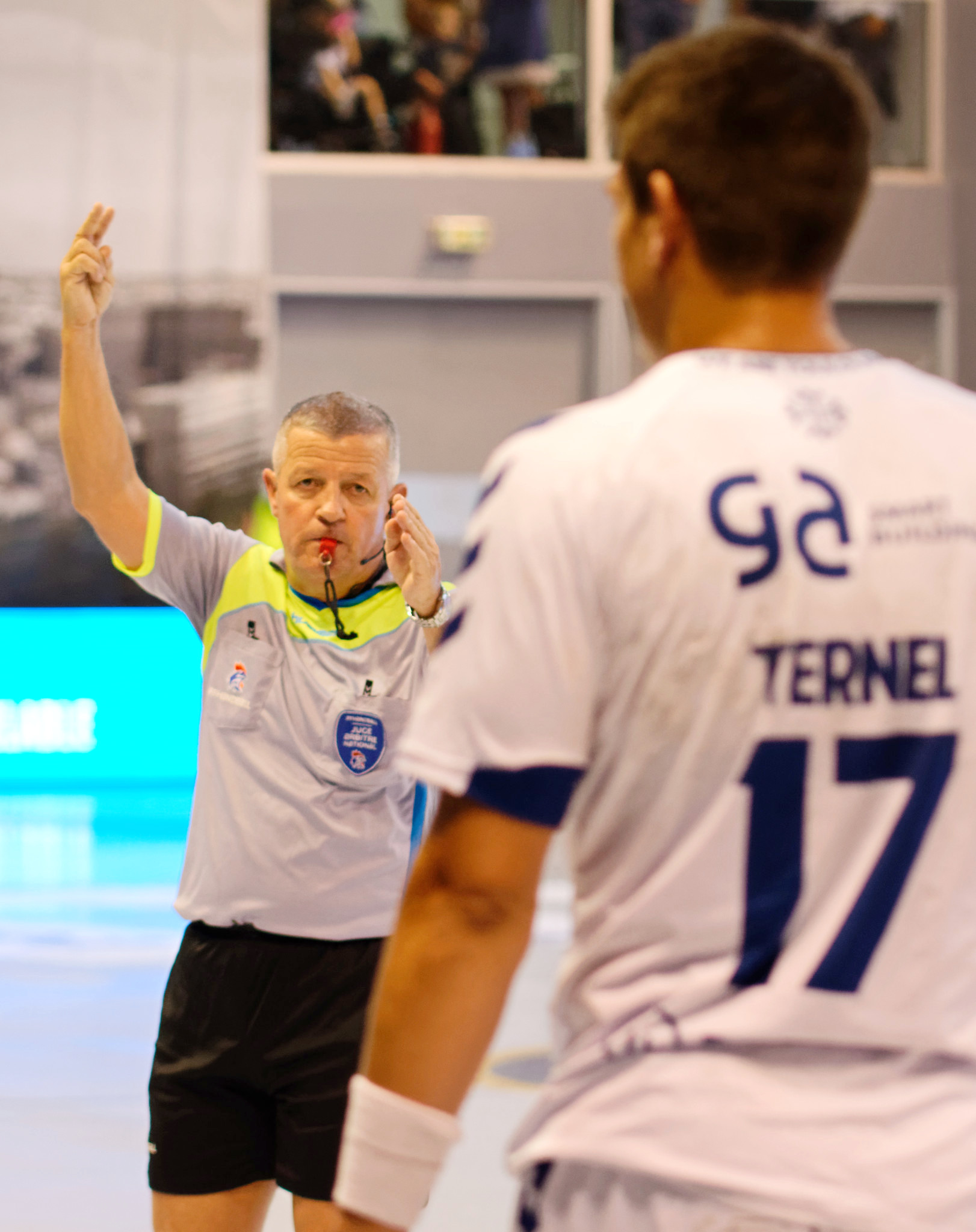 Romain Ternel (alors demi-centre du Fenix Toulouse Handball est sanctionné d'une exclusion de deux minutes lors de la rencontre entre l'US Ivry et Touloouse. A Ivry, le 31 mai 2017.